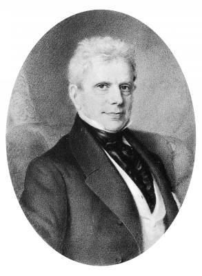 Sina György Simon bankár, nagybirtokos és mecénás. Az Osztrák Nemzeti Bank igazgatója, Görögország bécsi főkonzulja.